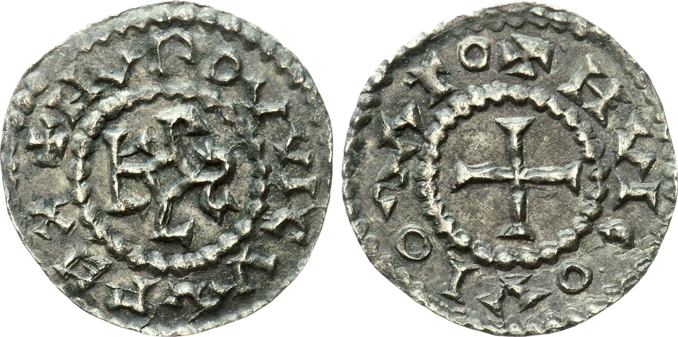 Nom de l'atelier/ville : Visé Métal : argent Diamètre : 18mm Axe des coins : 1h. Poids : 0,96g. Degré de rareté : R3 Titulature avers : + HVDOVVICVS PEX, (légende commençant à 9 heures). Description avers : Monogramme carolin (KAROLVS). Traduction avers : (Louis, roi). Titulature revers : + H VICO VIOSATO. Description revers : Croix. Traduction revers : (Du vicus de Visé).